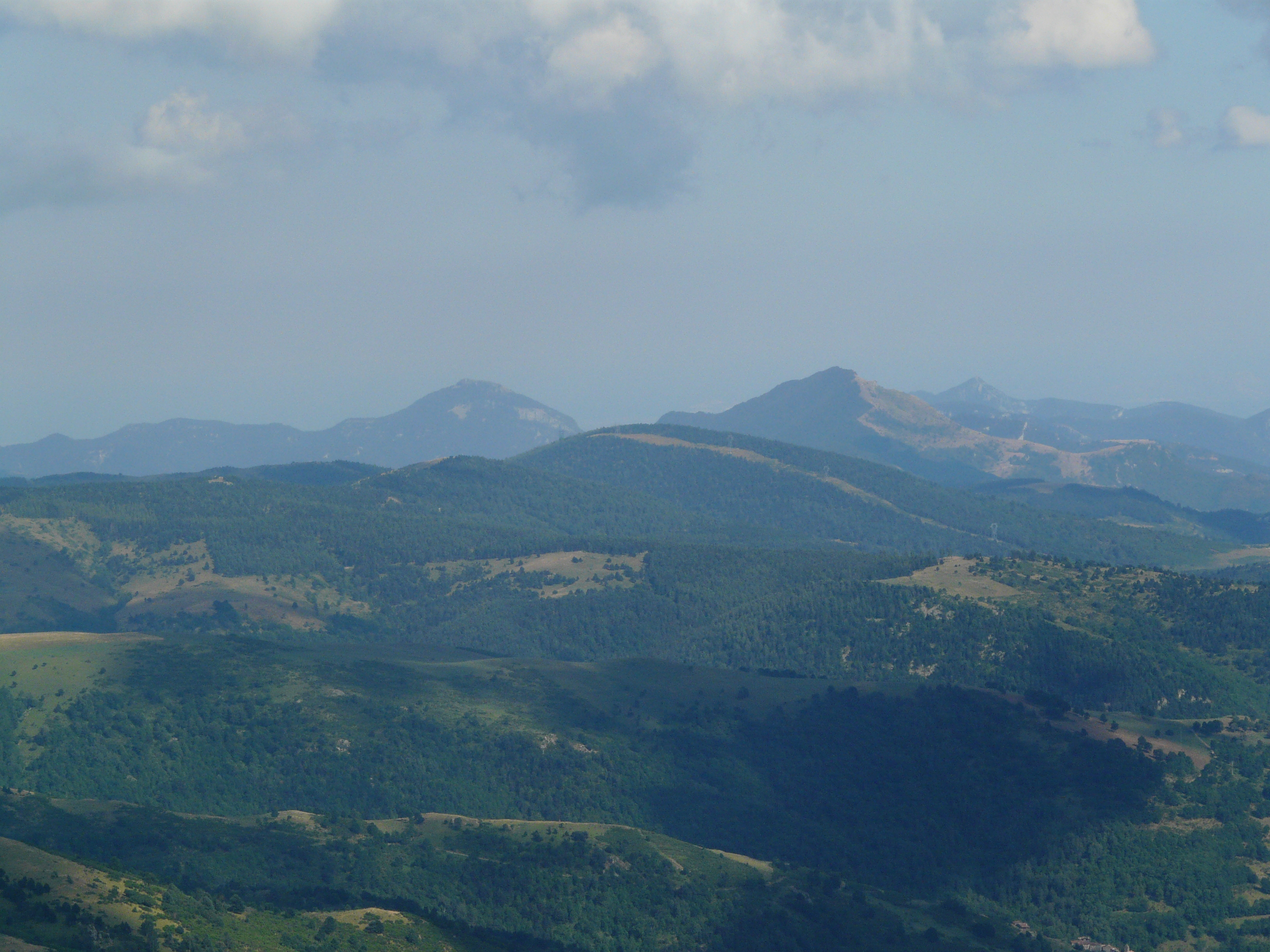 Fotografia presa en una excursió de la Collada Fonda al Costabona.